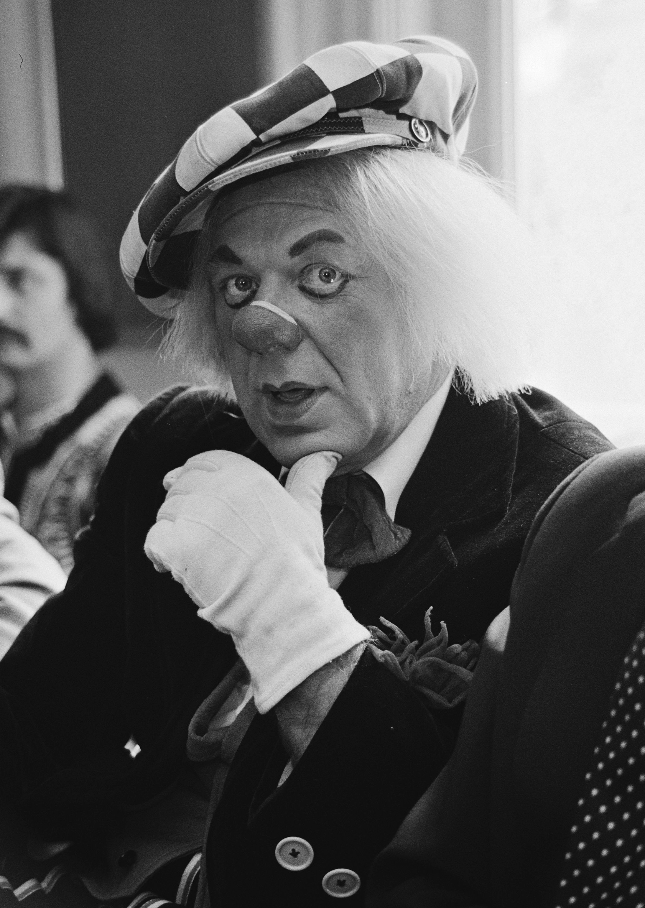 Russische Staatscircus in Amsterdam